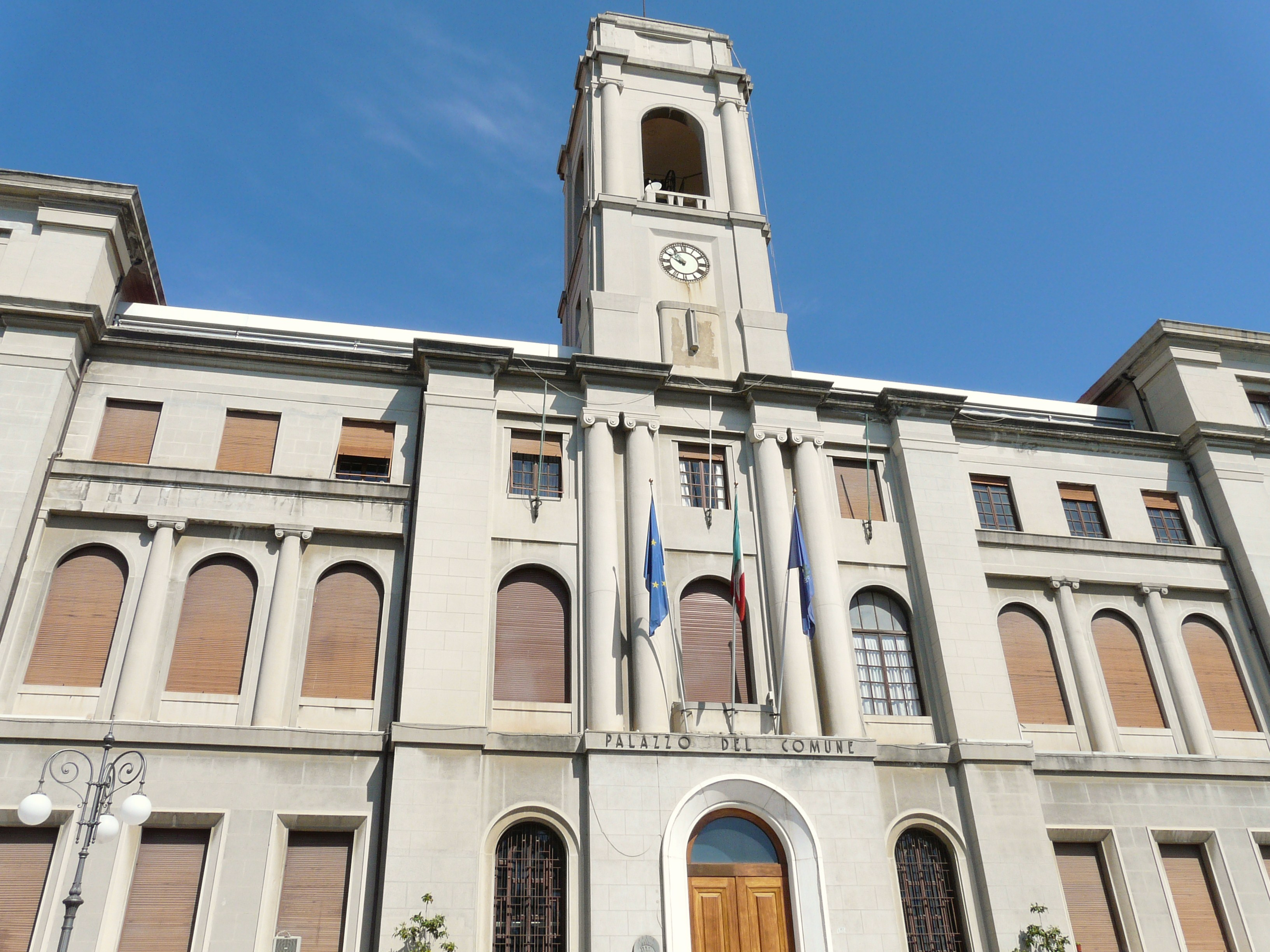 Municipio di Imperia, Liguria, Italia